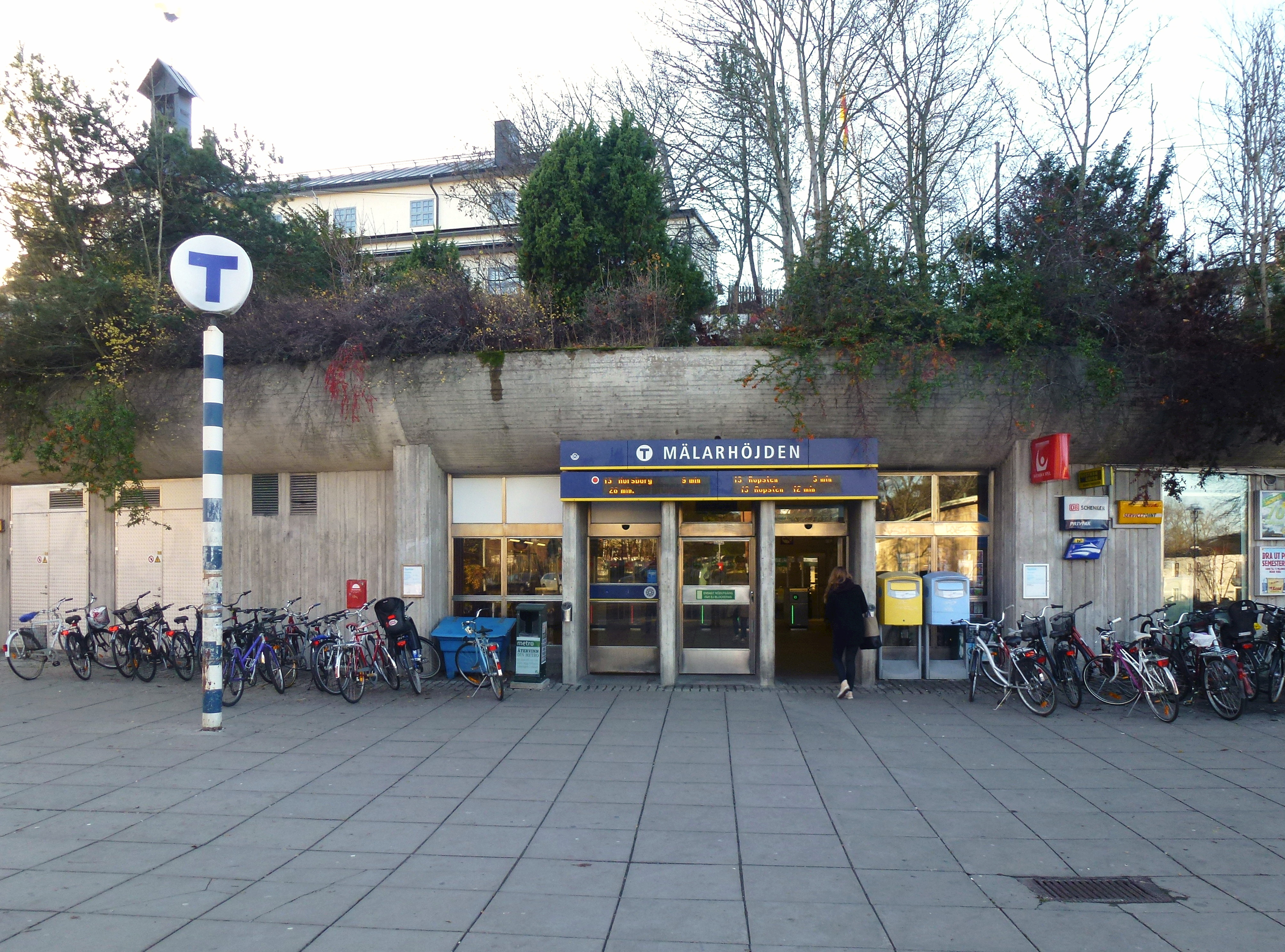 Mälarhöjdens tunnelbana, entré